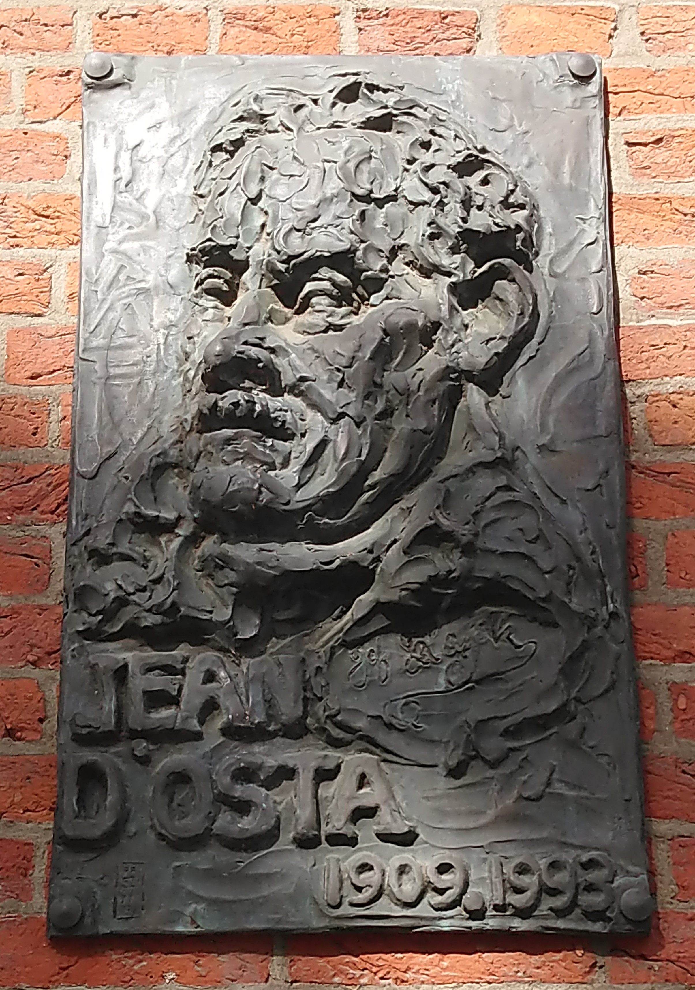 Jean D'Osta memorial plaque, Bruxelles